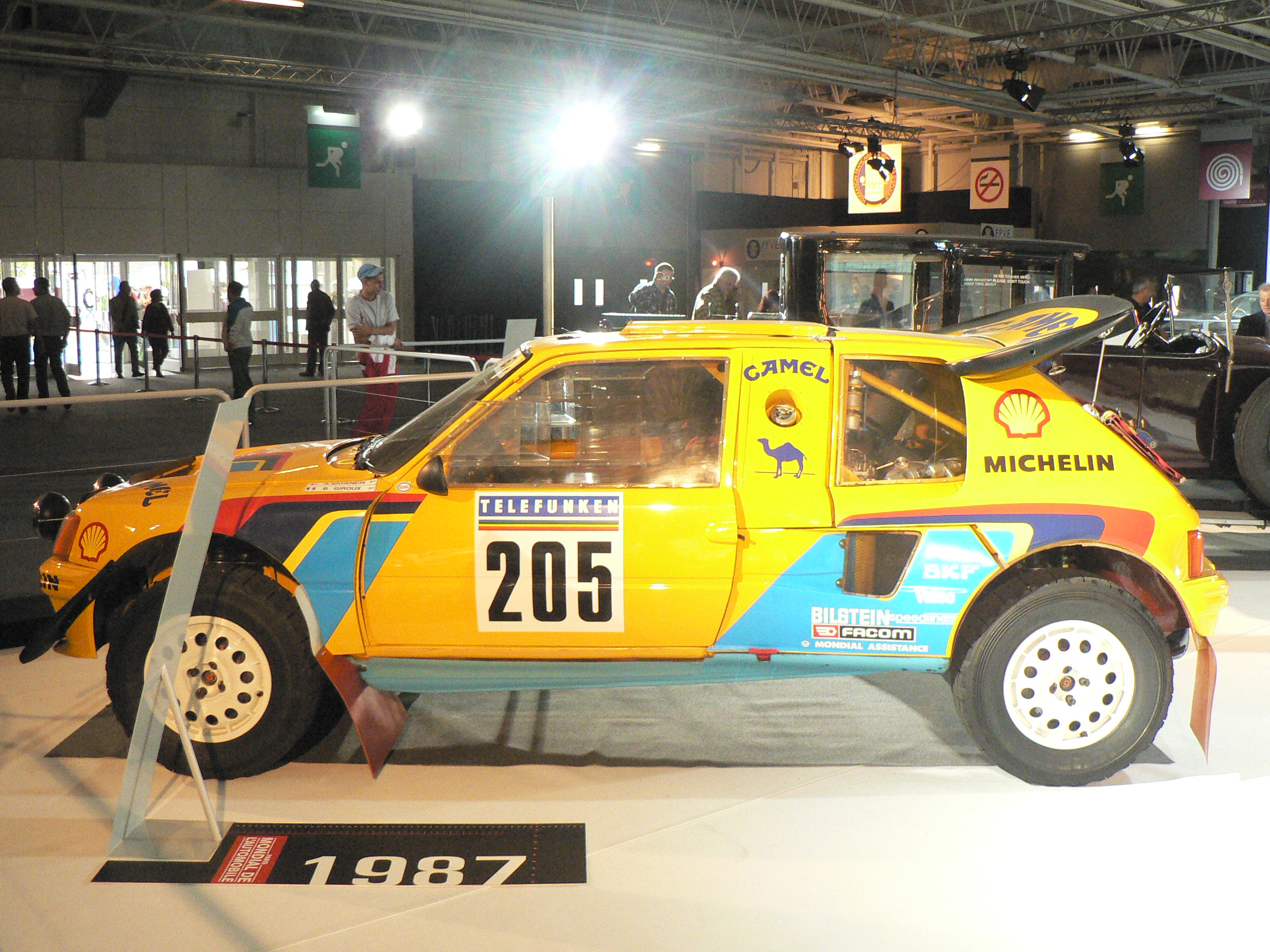 Mondial de l automobile de Paris (October 2006)